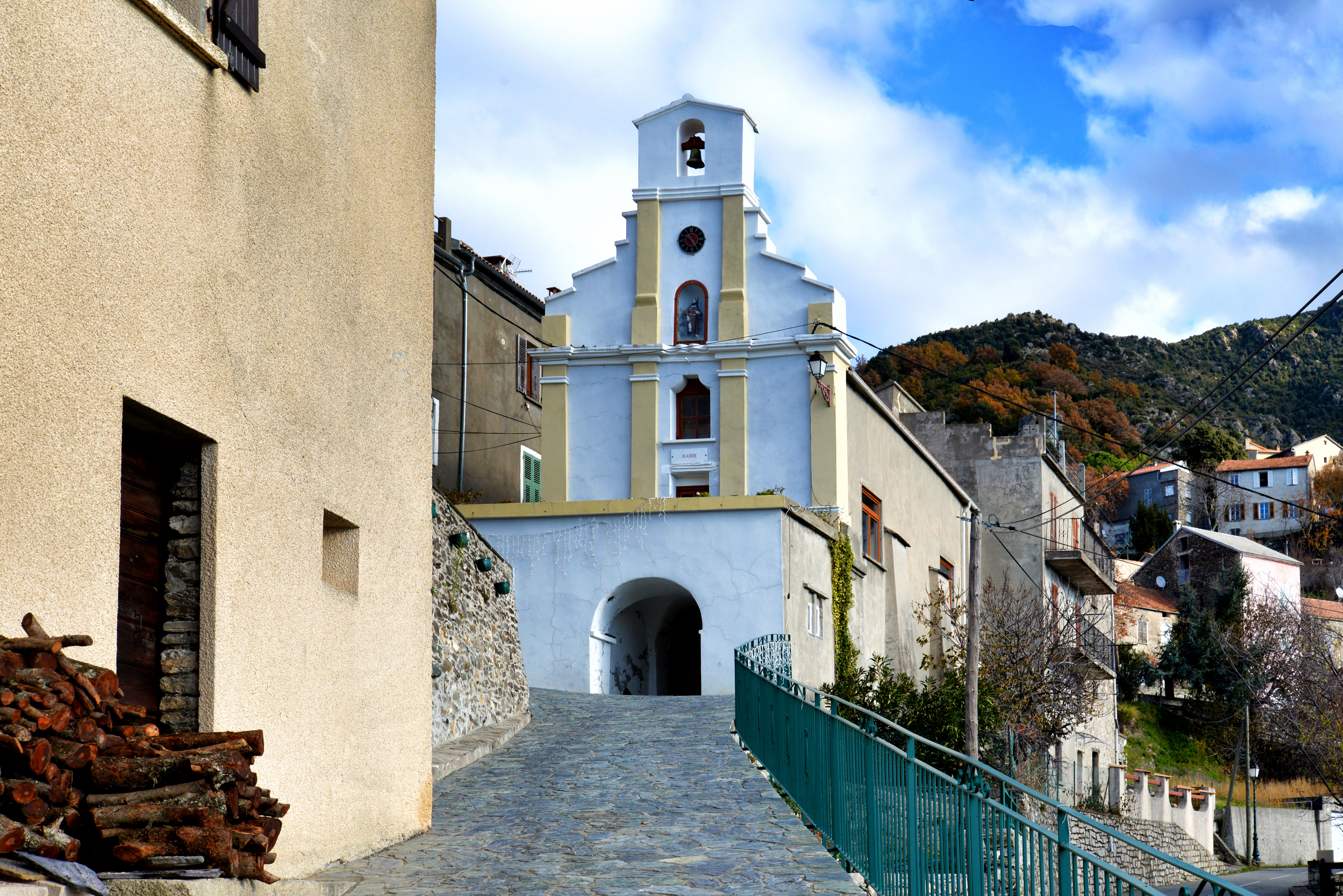 Altiani, Rogna (Corse) - La mairie